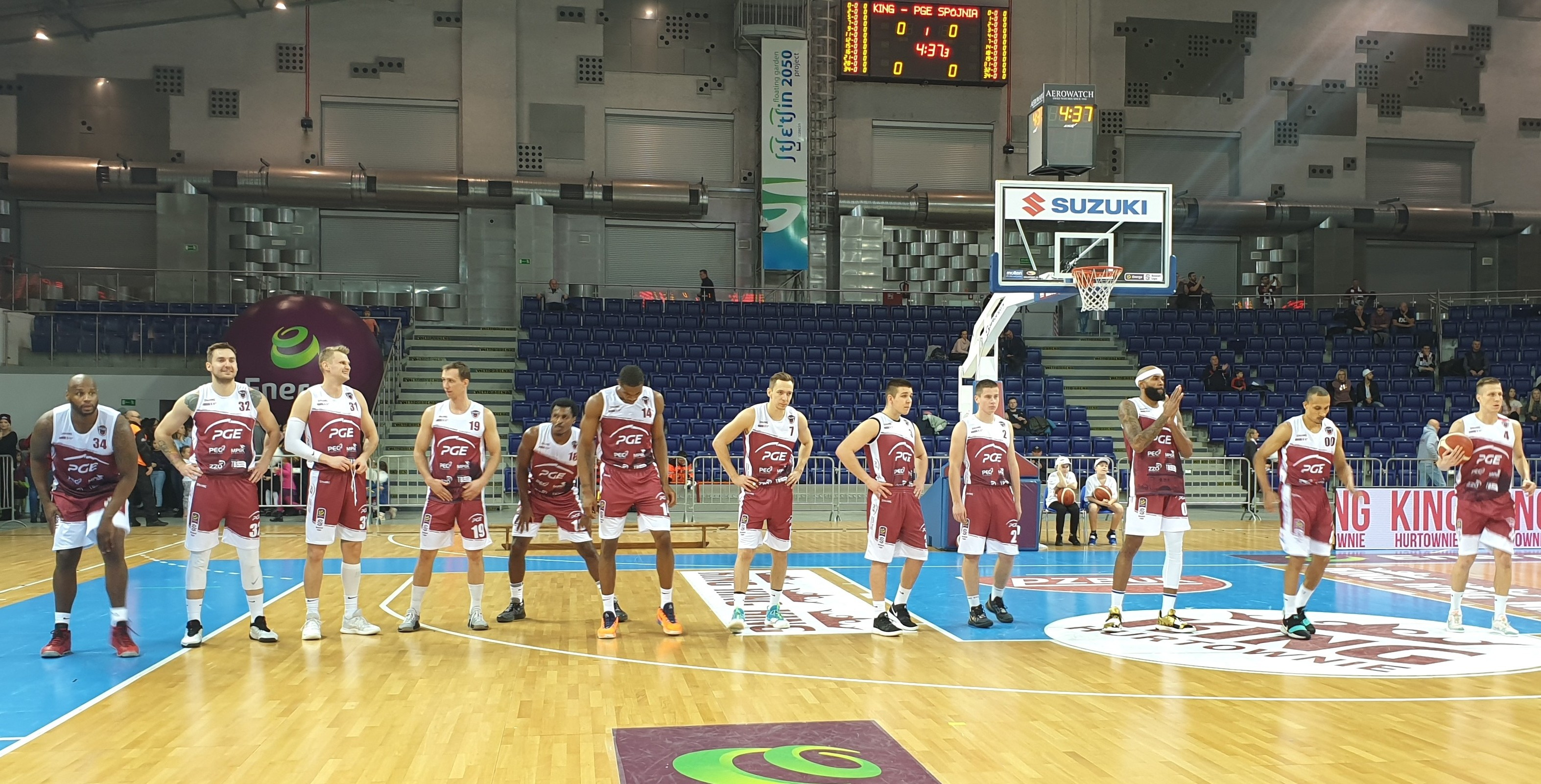 King Szczecin - PGE Spójnia Stargard